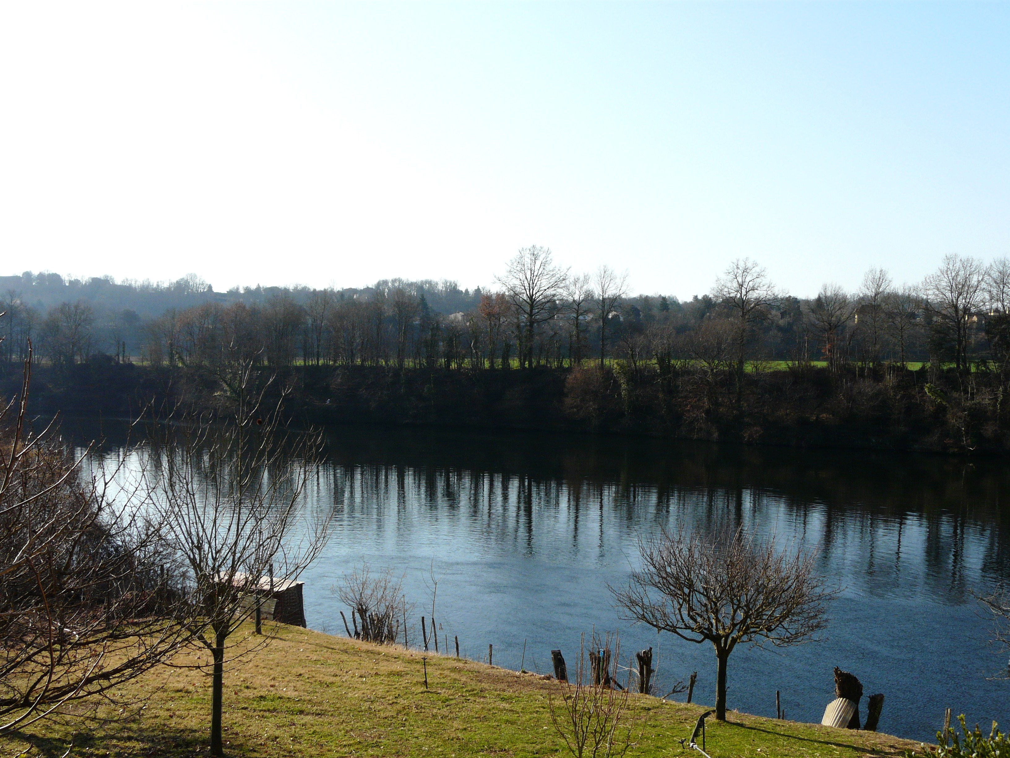 La Dordogne à la Borie-Basse, Baneuil, Dordogne, France. Sur la rive en face, commune de Varennes.